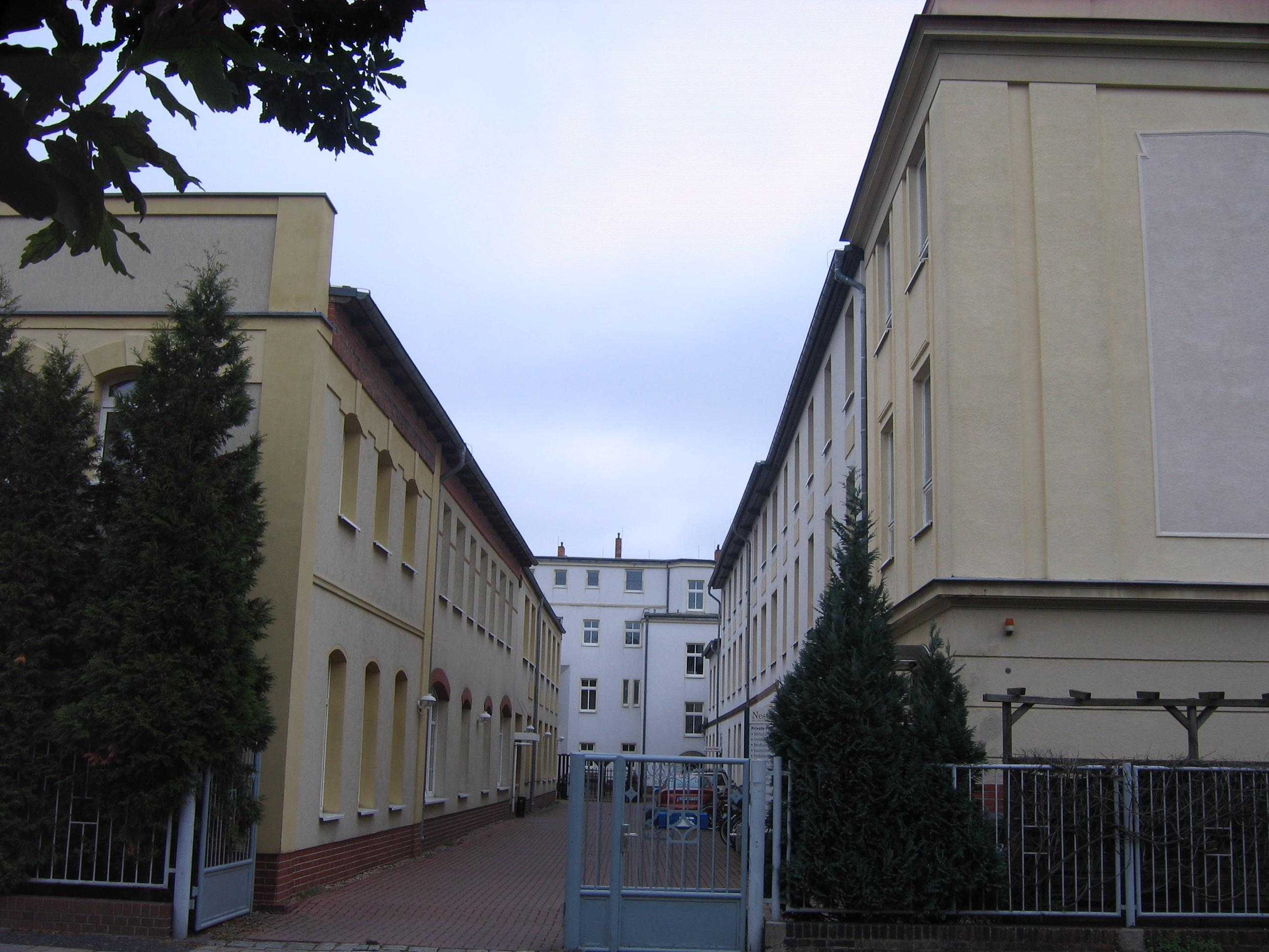 Wernerstraße 19